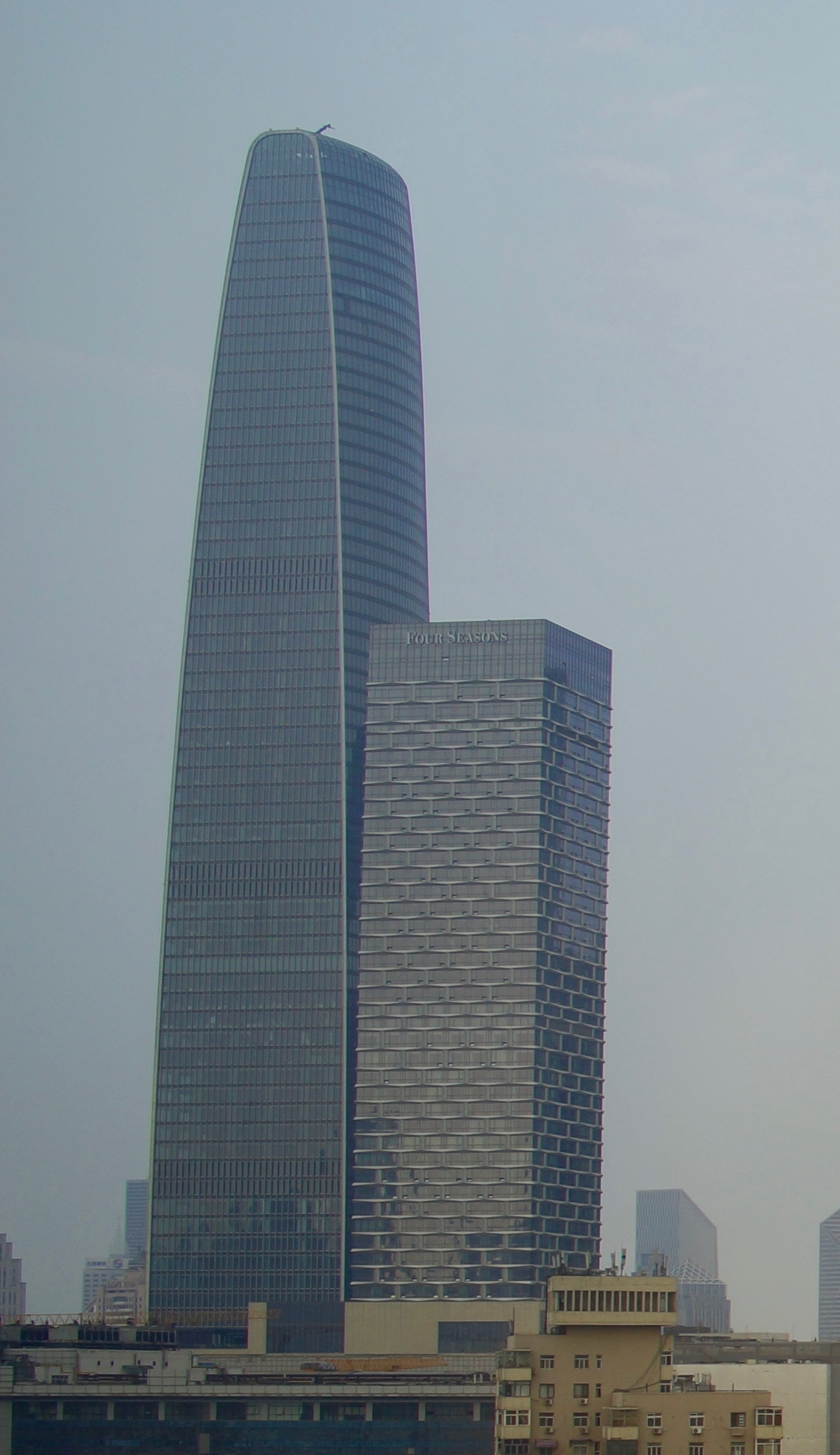 Tianjin Modern Office Tower